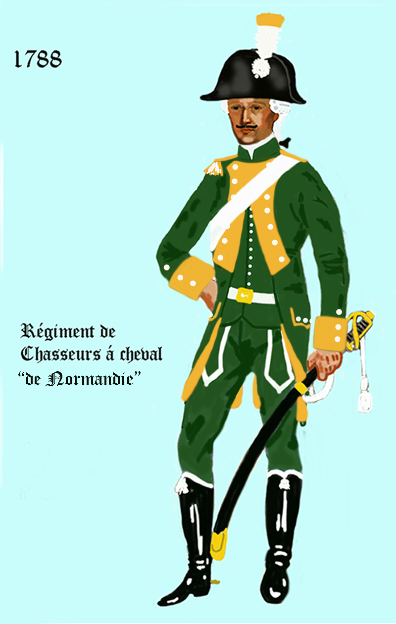 l'uniforme du régiment Chasseurs à cheval "de Normandie" de 1788